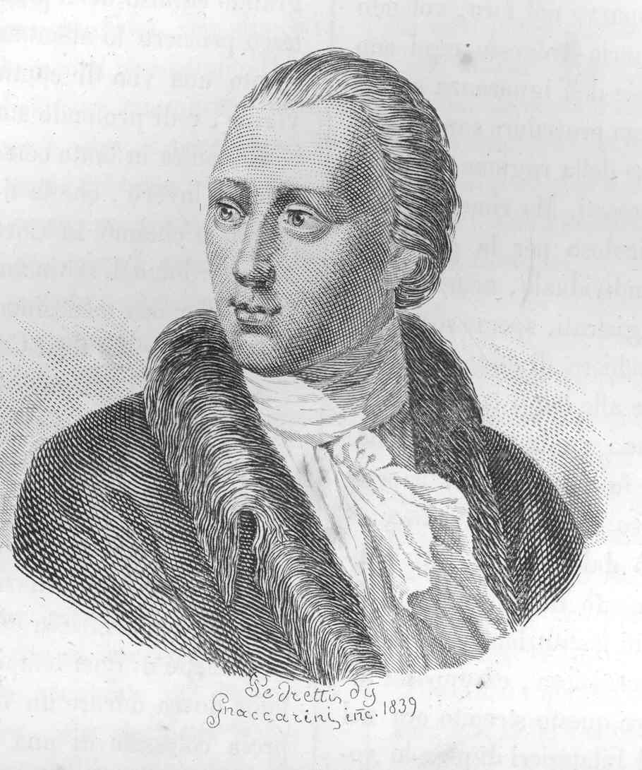 Ritatto di Gaetano Filangieri-incisione da disegno, opera il cui autore è morto da più di 70 anni, acquisita da scanner. Autori Pedretti Gnaccarini, tratto da Poliorama Pittoresco, 1839.